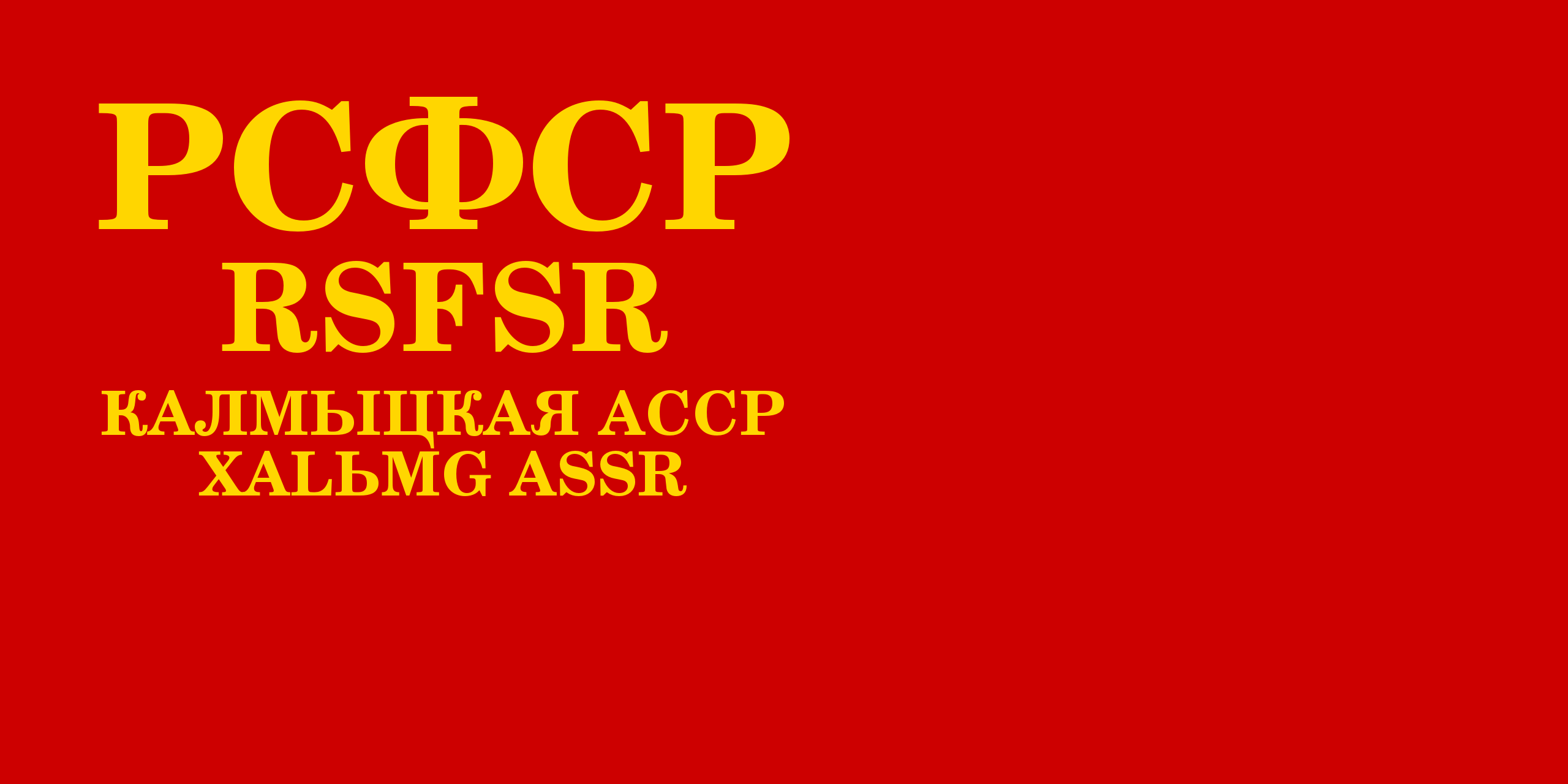 утверждённый в 1938 году официальный флаг Калмыцкой АССР